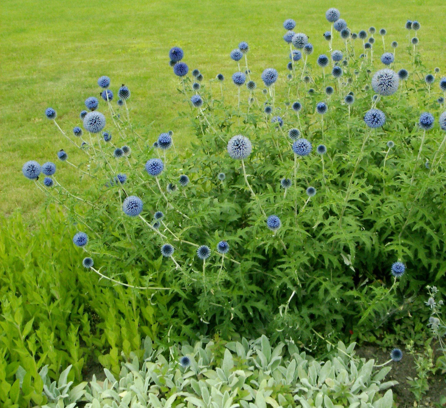 Kwitnący przegorzan kulisty (Echinops ritro)